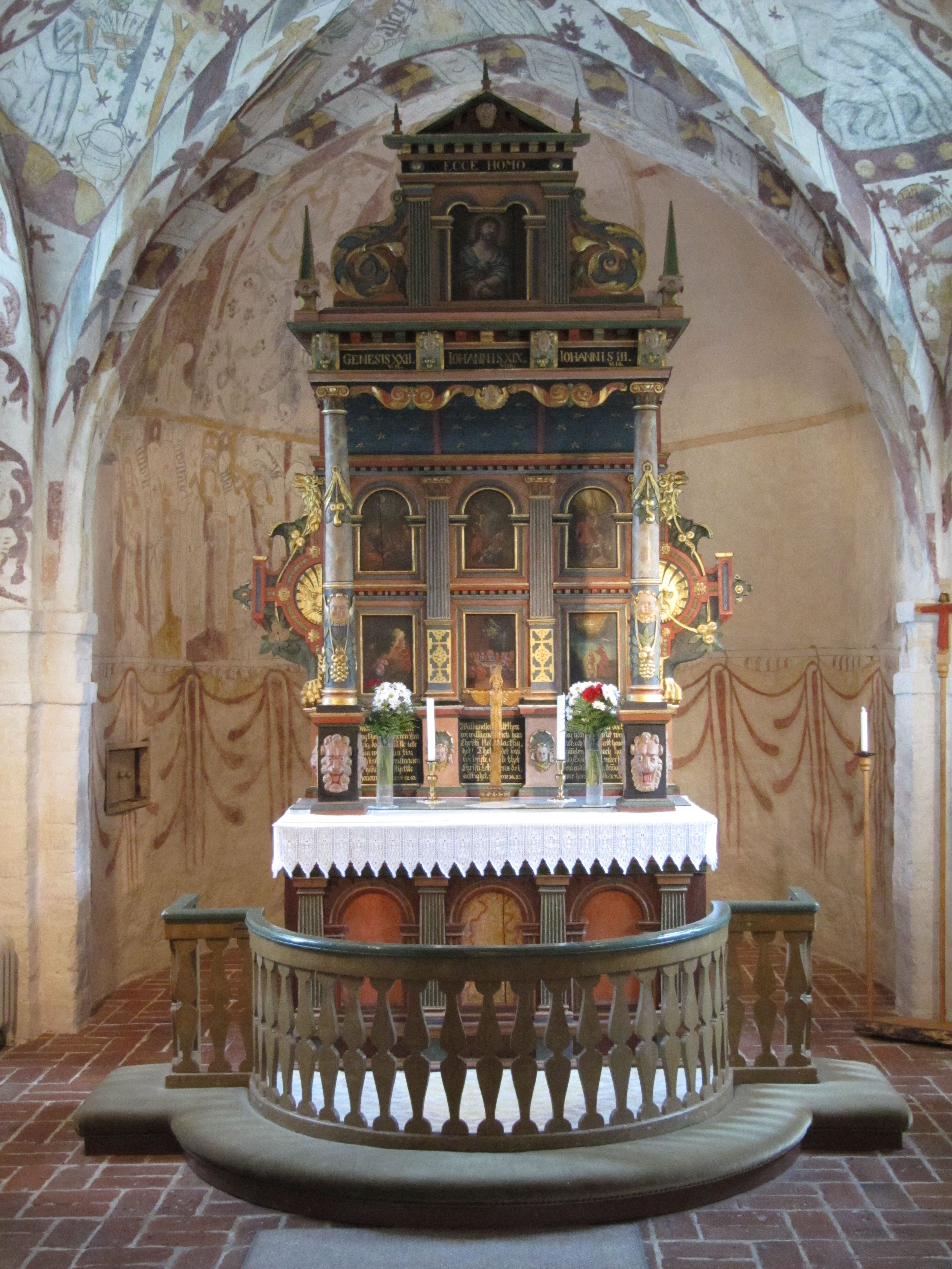 Kor i Farstorps kyrka